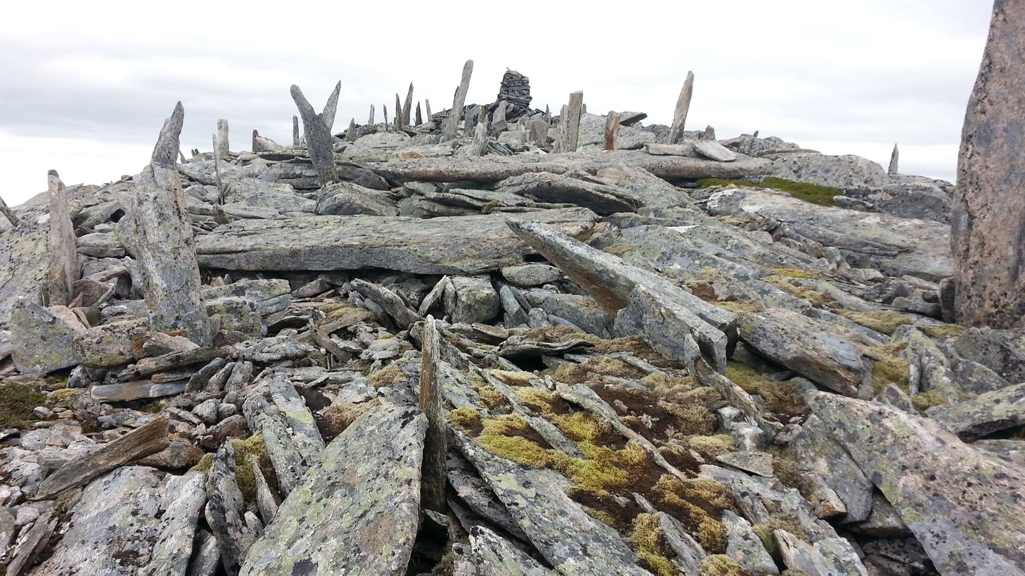 Kjeipen Haram. Steinhellene på toppen.